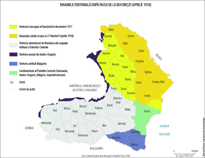 Уезды Румынии 1914 г. после Бухарестского Мира